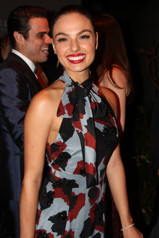 3 - Isis Valverde-001